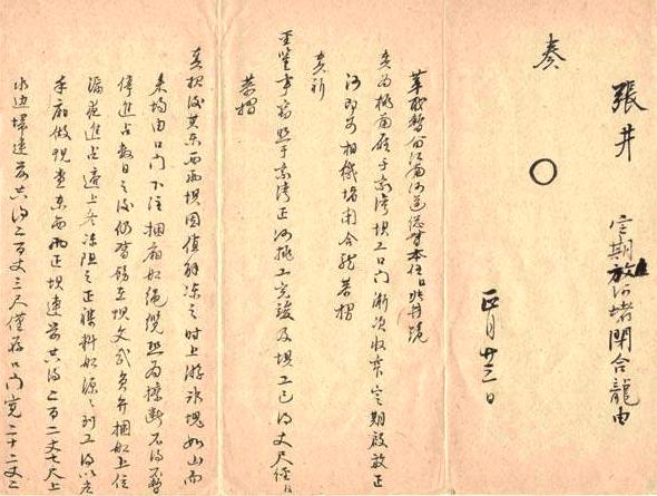 張井奏報于家灣口門漸次收定空期啟放正河堵閉合龍各情形摺